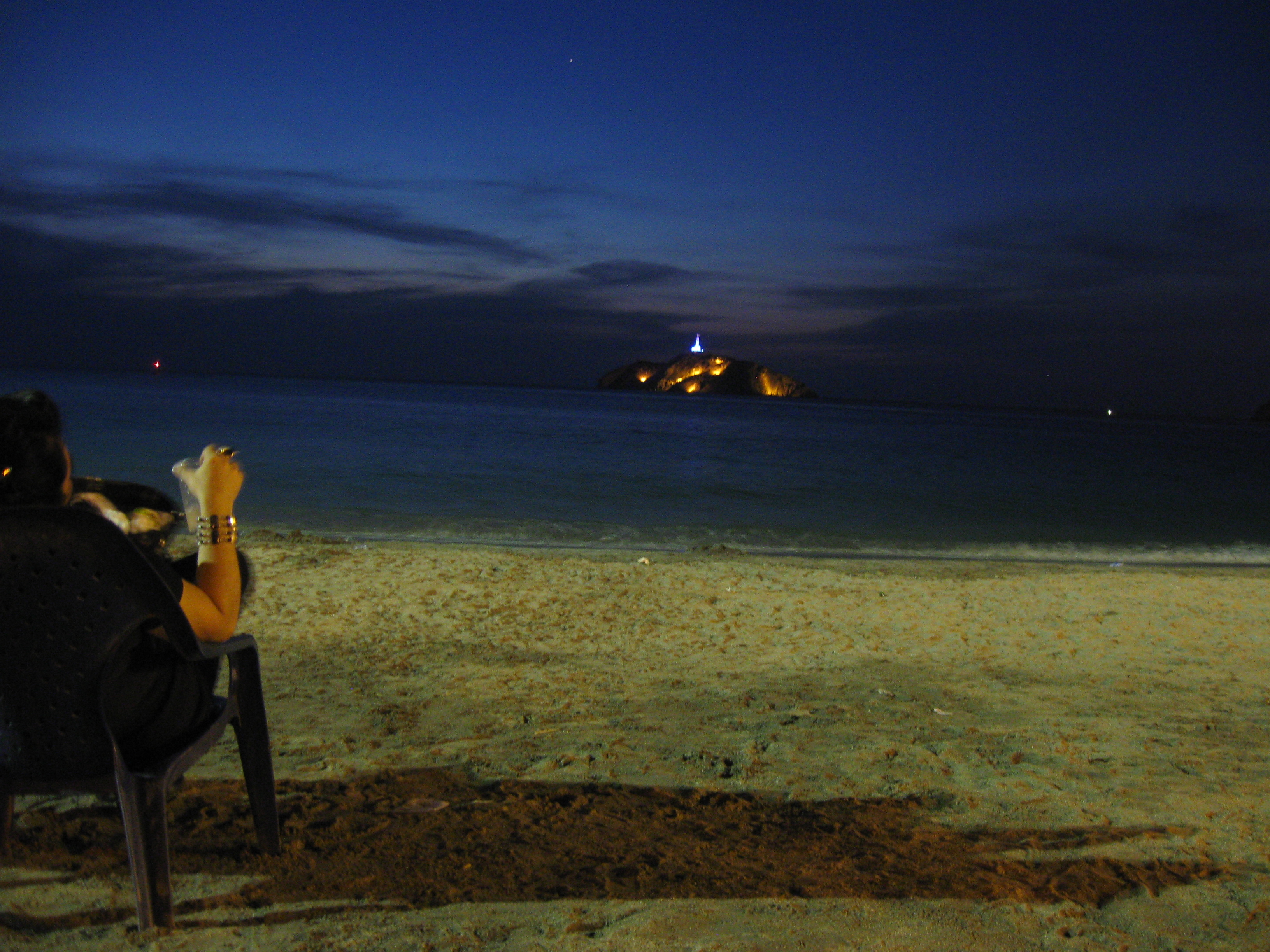 Faro de la Bahia de Santa Marta visto de Noche